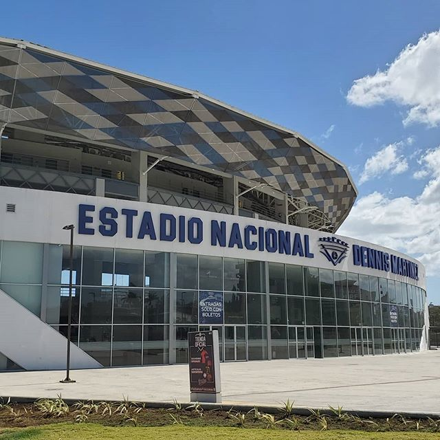 Vista del estadio Dennis Matinez